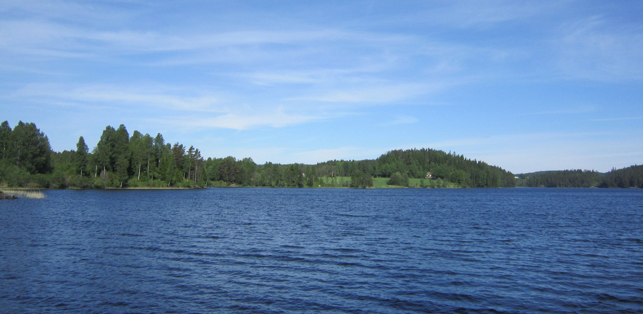 Nössjö, Dals-Ed kommune, Sverige